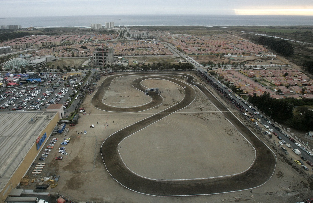 Pista de presentación y zona de asistencia del Gran Premio de La Serena en el Rally Mobil Chile 2012.